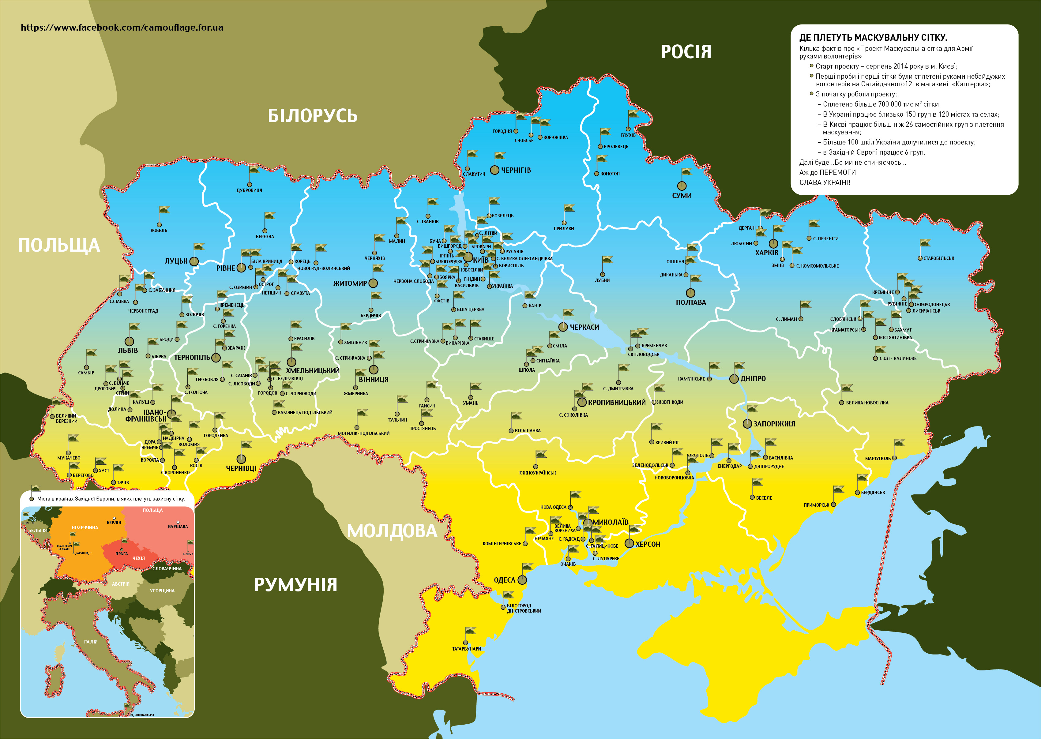 Карта України. Пункти плетення маскуваної сітки для Української Армії в 2014-2016 роках